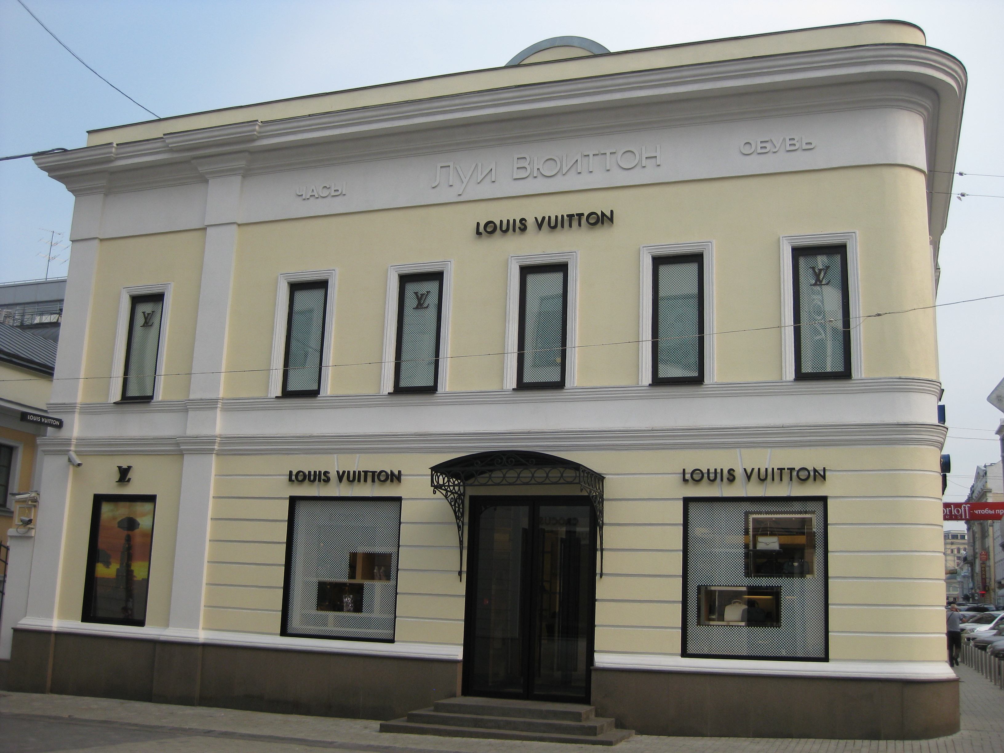 Louis Vuitton in MOscow